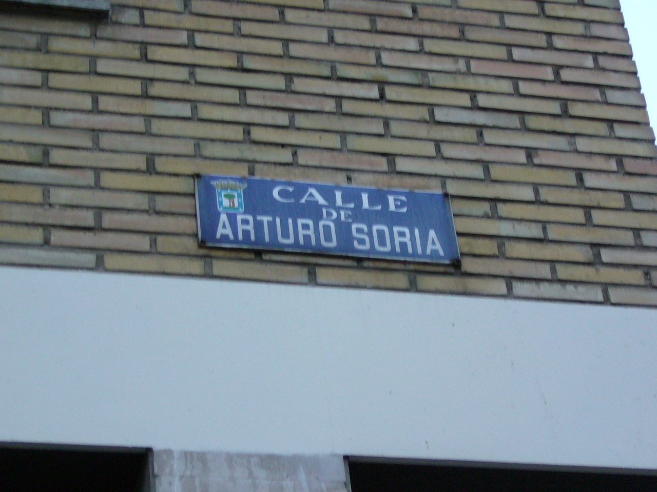 Señal de la Calle de Arturo Soria Calle Arturo Soria en Madrid, Ciudad Lineal Arturo Soria street in Madrid